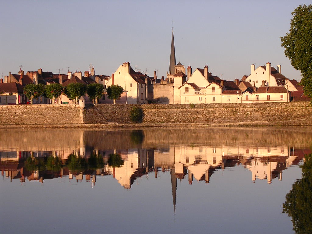 Auxonne et les remparts de Saône, France, Bourgogne, Côte d'Or.